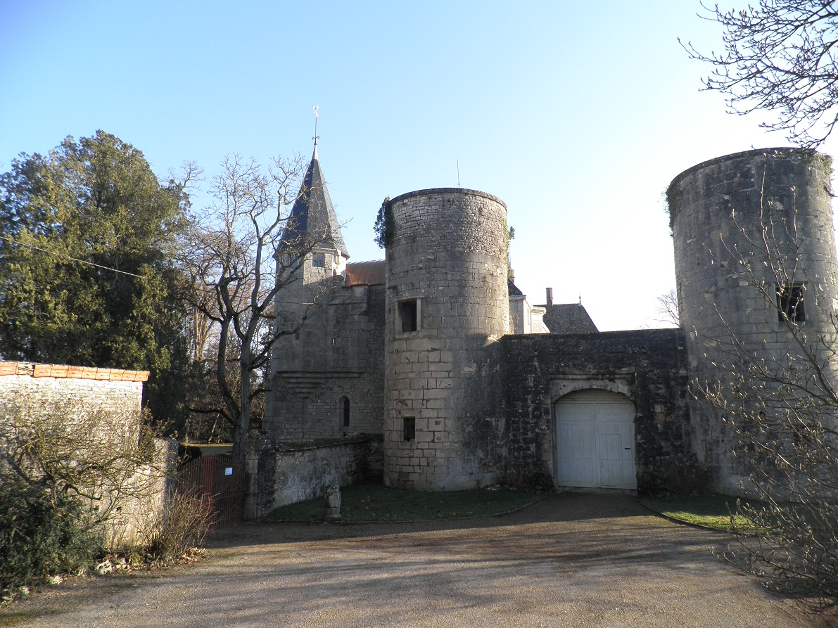 Vue extérieure du château